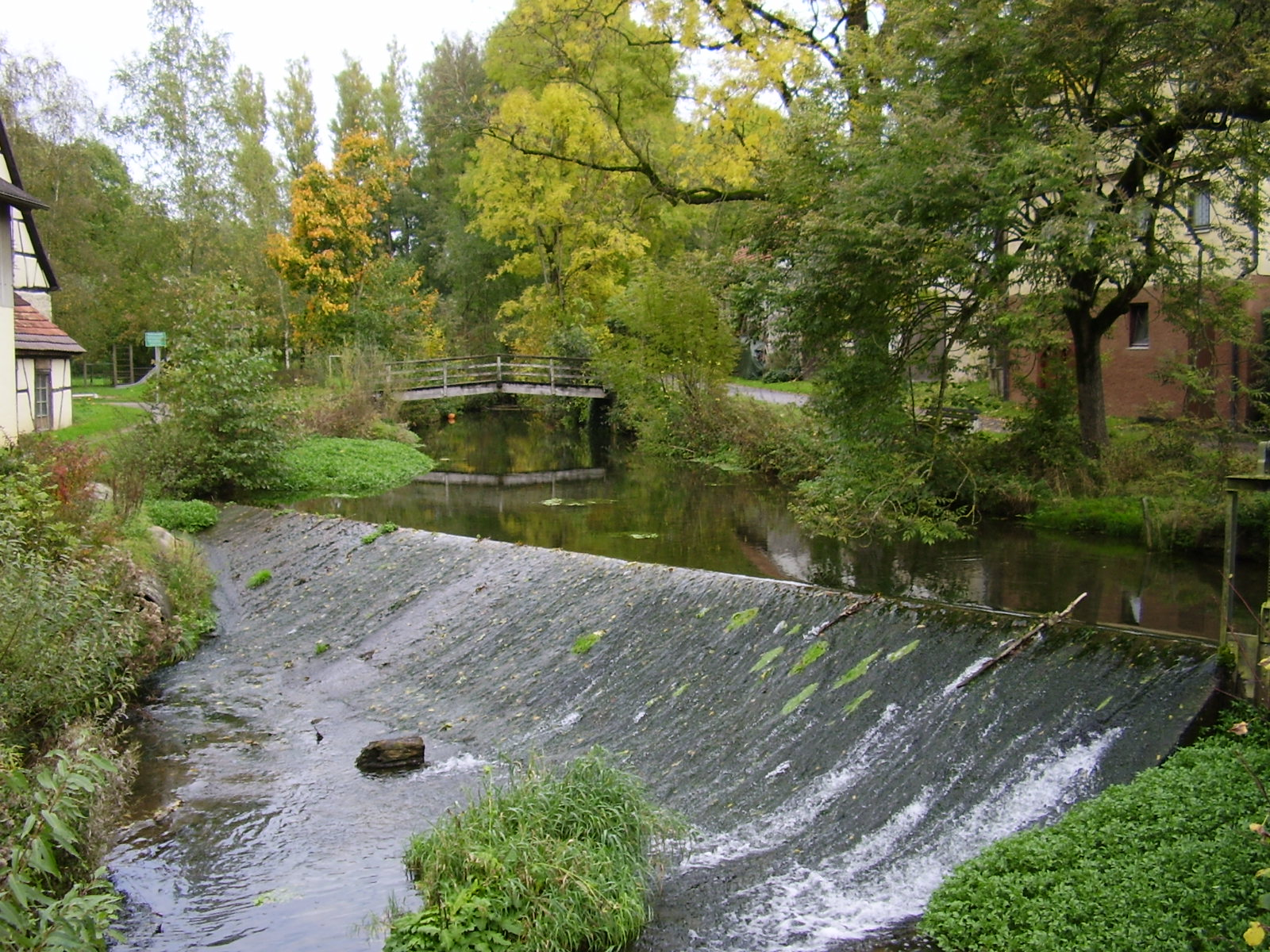 Kessachwehr in Unterkessach